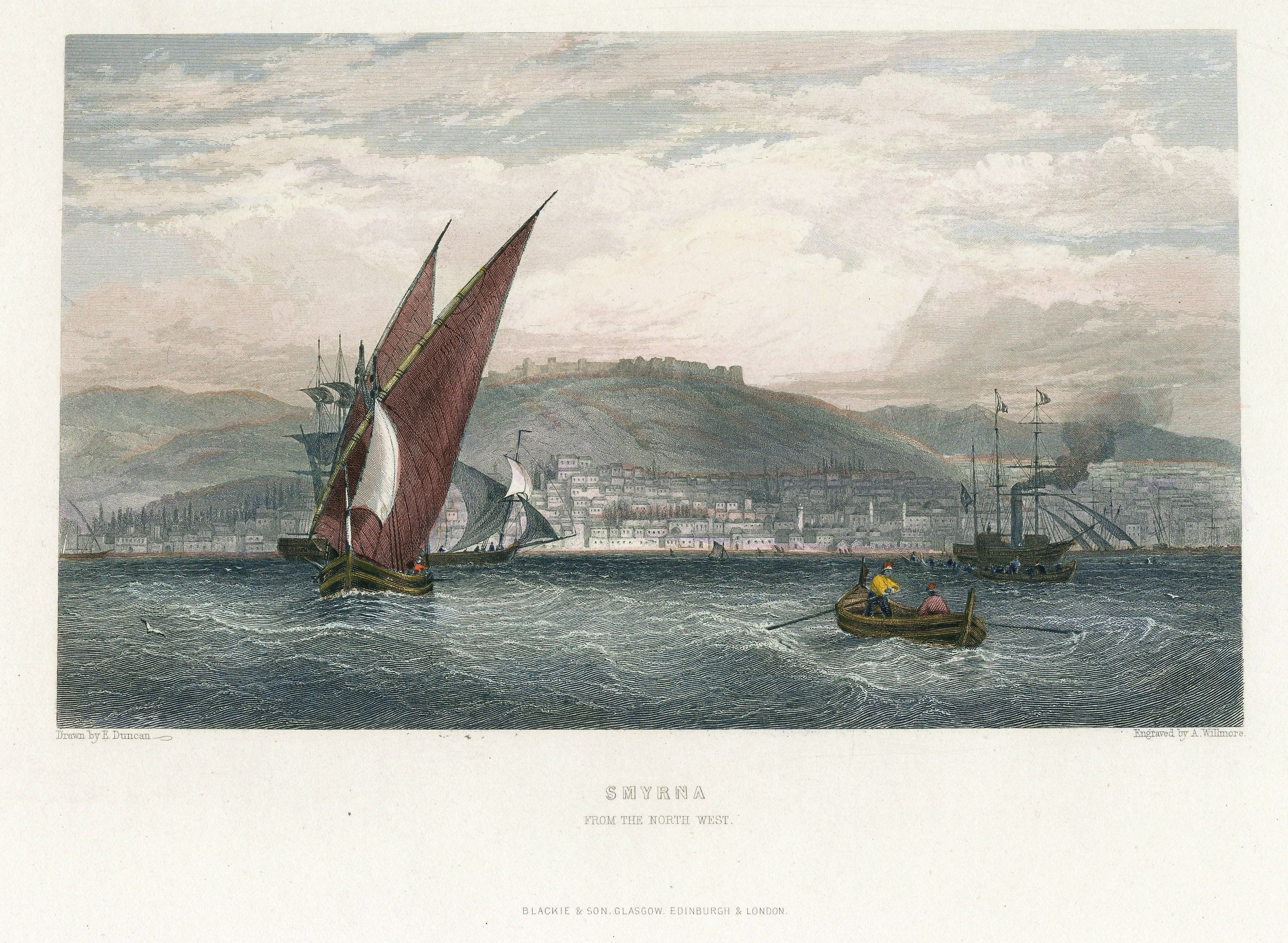 Willmore'a ait İzmir gravürü.